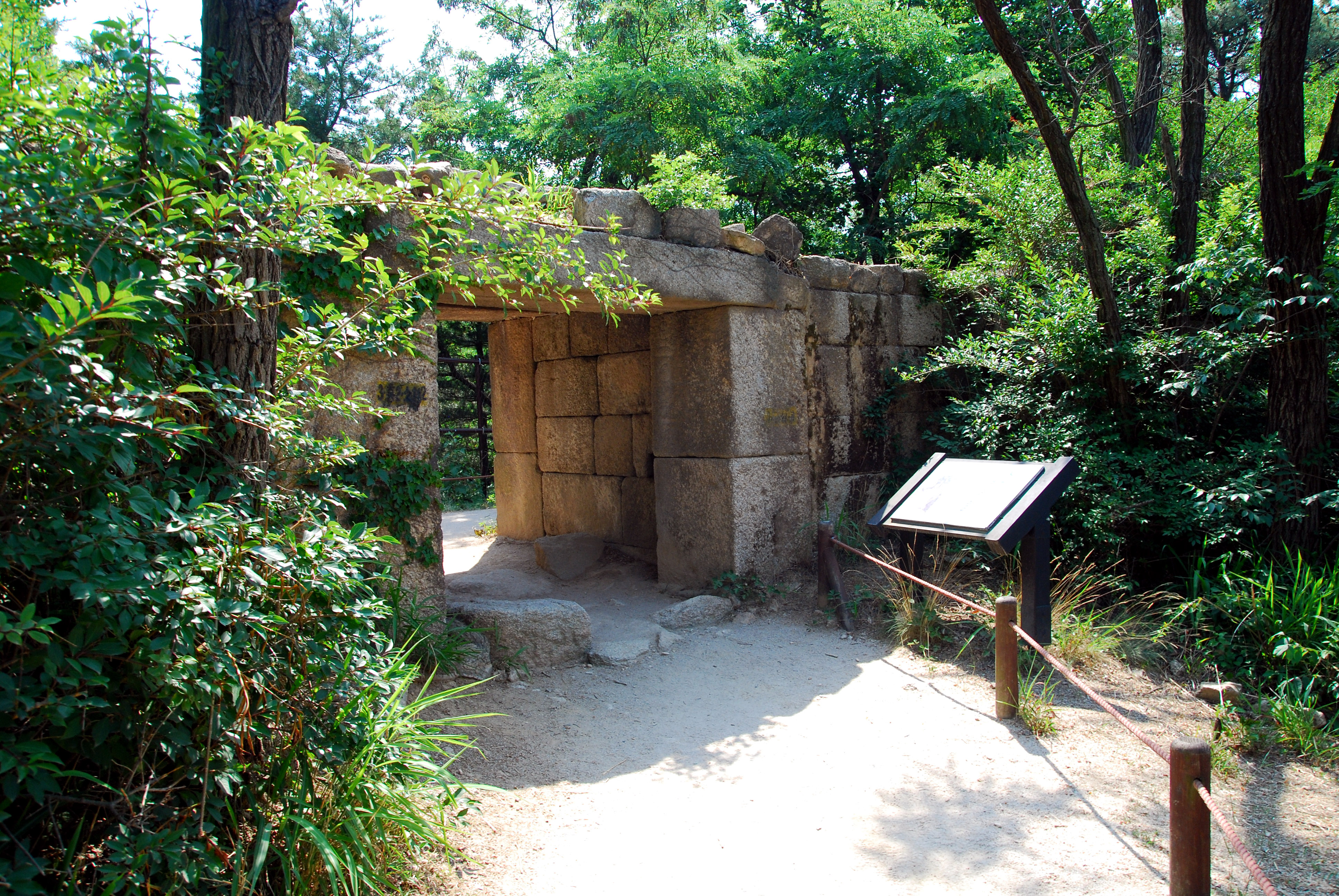 탕춘 대성 중간에 있는 통로